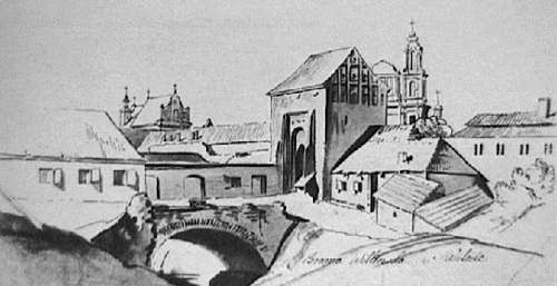 Vilijos vartai